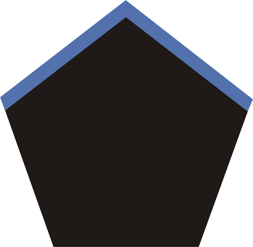 Patka łączności (na kołnierz) wprowadzona w Wojsku Polskim w Anglii w 1941